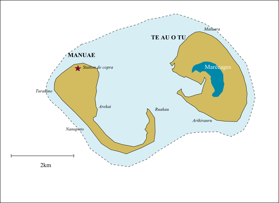 Carte de Manuae (îles Cook) - Manuae island Map (Cook Islands